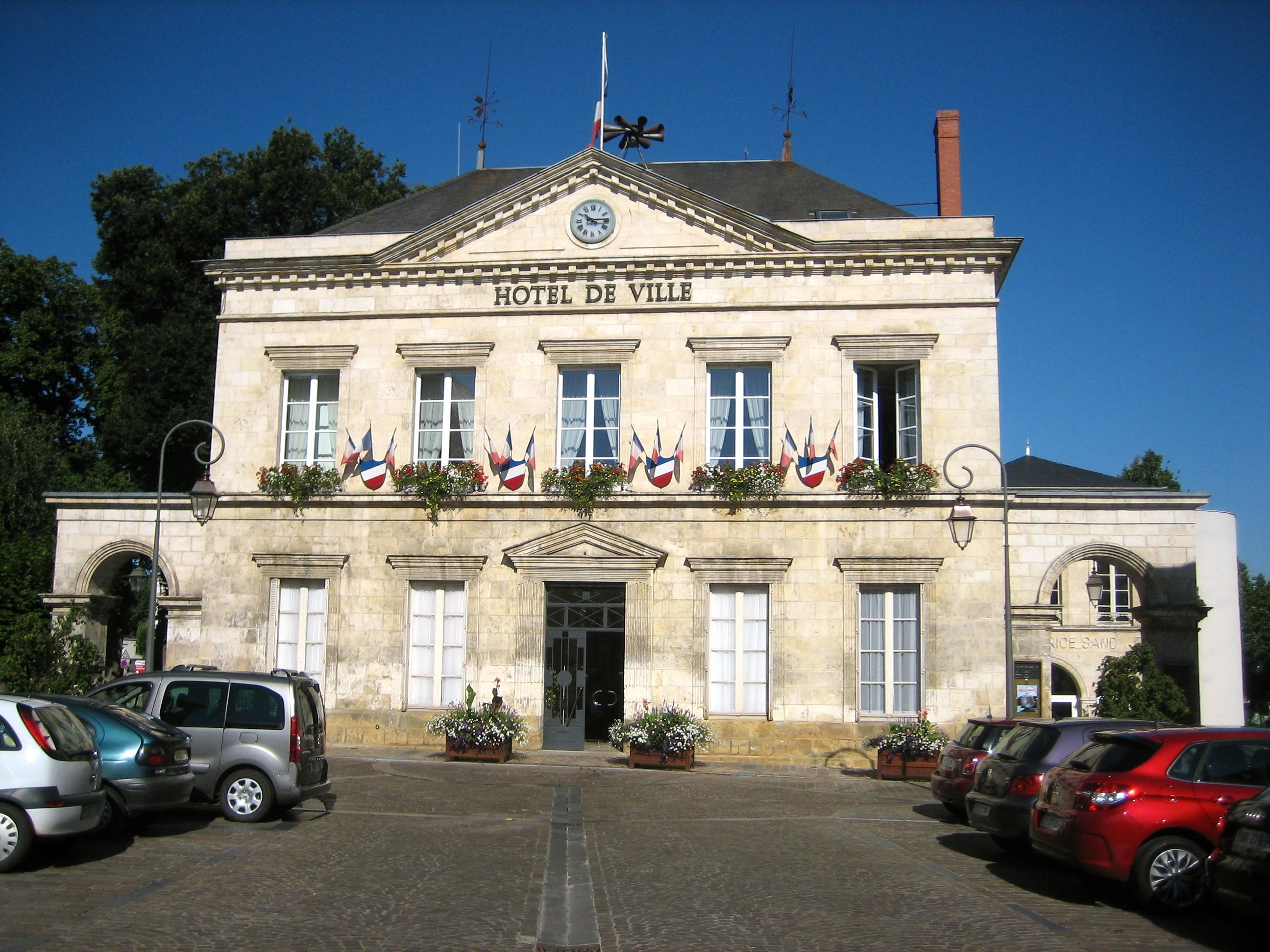 Hôtel de Ville de La Châtre en Berry. La façade date de 1836